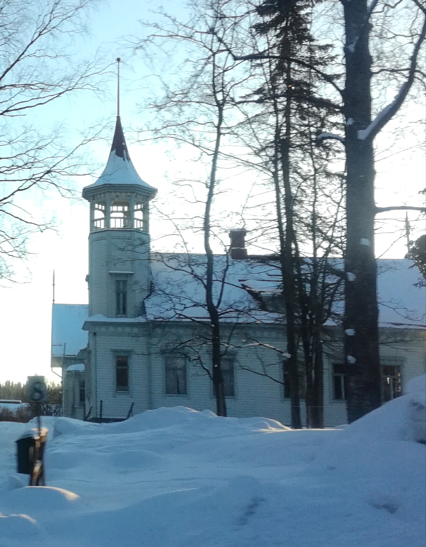 Ahlbackan tila Laukaan Vihtavuoressa.